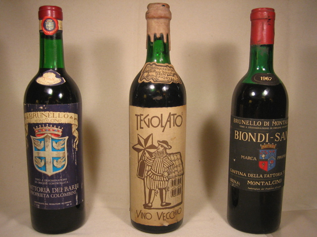 Brunello di Montalcino "Biondi-Santi,1967 - Brunello di Montalcino "Fattoria dei Barbi,1968 ,bottiglia N° R7381 - Tegolato,1966, Bottiglie prodotte 39.200, bottiglia n°20.910. Cantina privata - fotografia personale